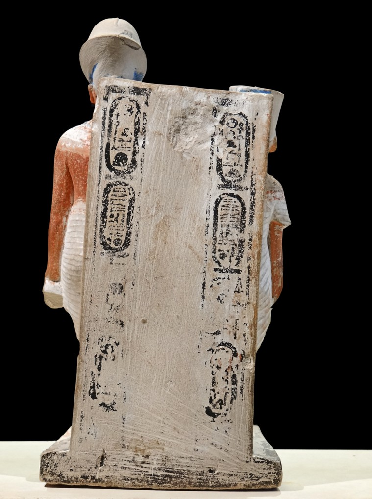 Le dos de la statuette d'Akhénaton et de Néfertiti avec les cartouches du dieu Aton, du roi et de la reine après 1345 av. J.-C. (après l'an 9 du règne) Calcaire peint